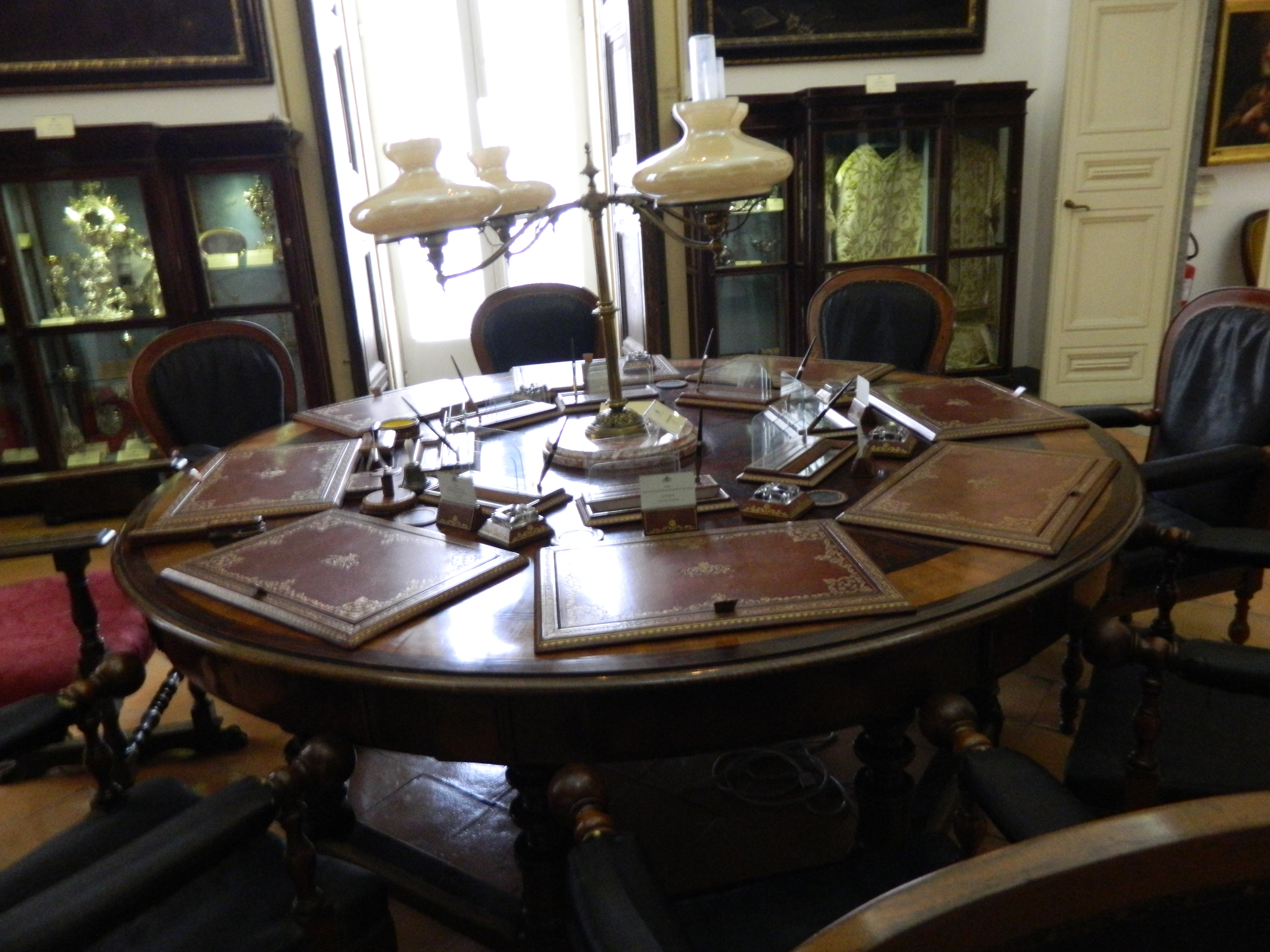 Tavolo ottagonale - Sala del Governo Pio Monte di Misericordia di Napoli